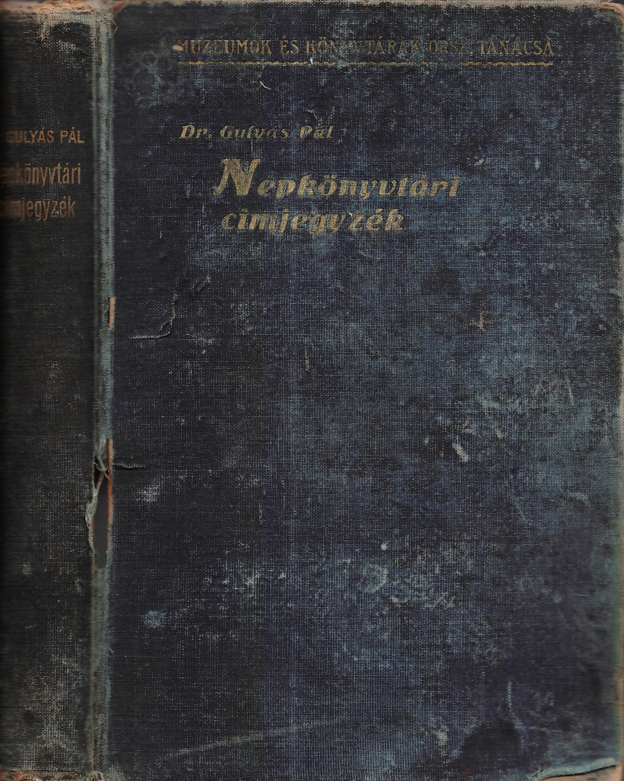 Gulyás Pál: Népkönyvtári címjegyzék (1910)